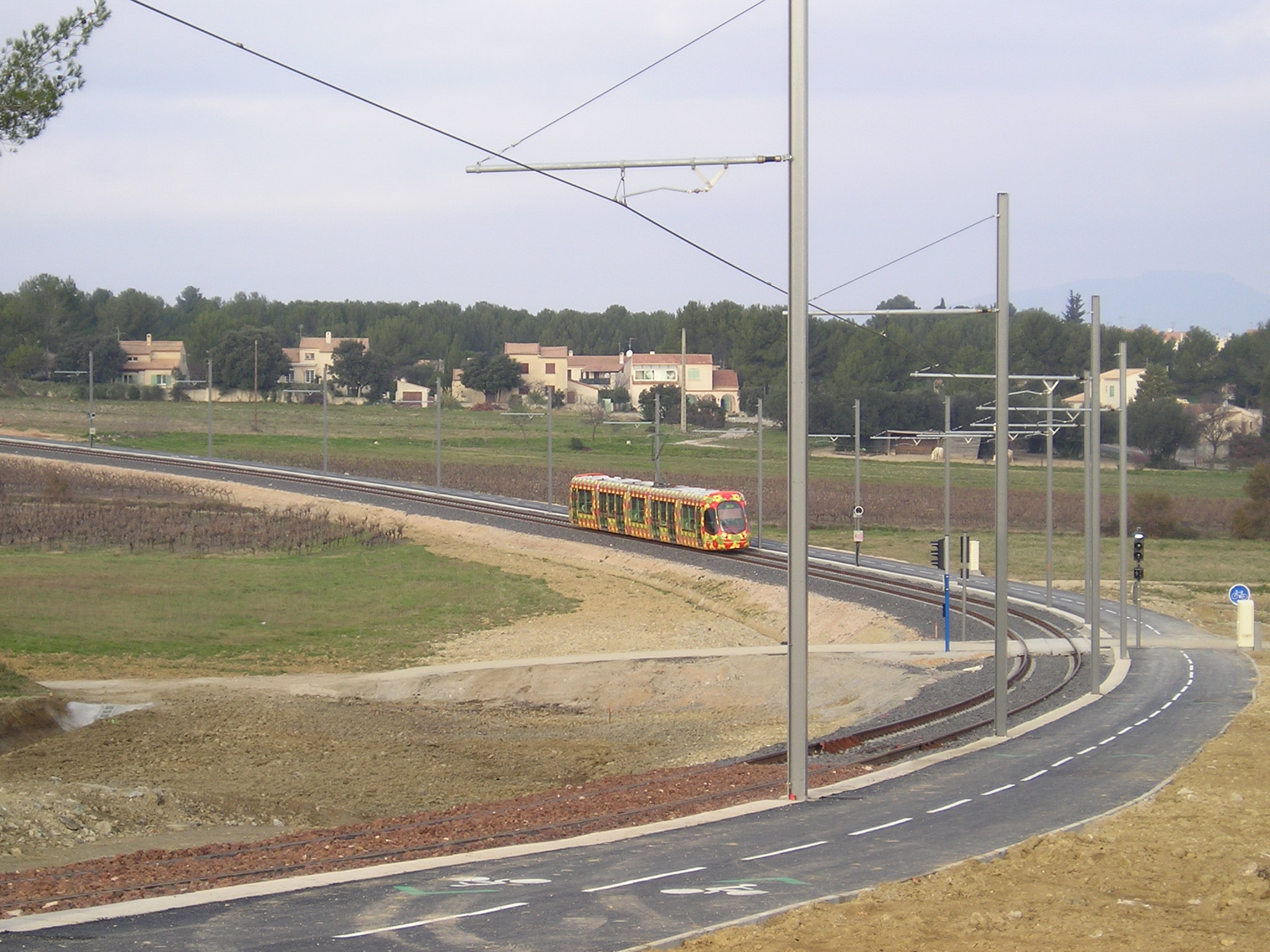 Une rame de la ligne du tramway de Montpellier se dirigeant vers Jacou (dont on aperçoit les maisons les plus au sud, sur la limite communale), en plein dans la courbe du mas de Caylus, dans la commune de Castelnau-le-Lez.